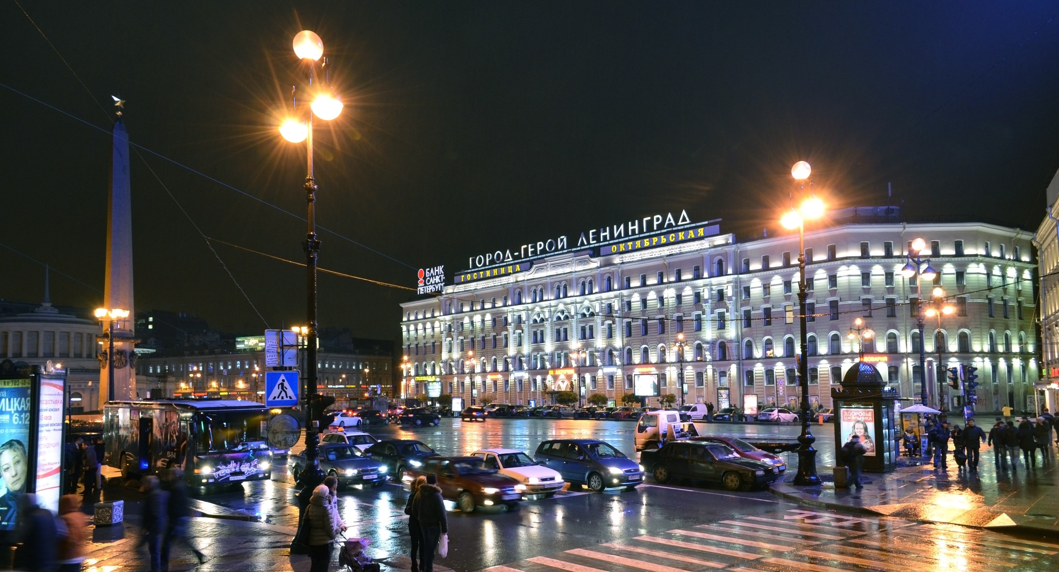 Вокзал Николаевский (Московский) (Санкт-Петербург и Лен.область, Санкт-Петербург, Восстания площадь, 2)